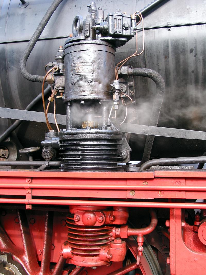 Steam locomotive air pump Description in de wikipedia Beschreibung: Dampflok P8 Detailansicht Fotografiert von Bernd Untiedt im Januar 2002 Lizenz: GNU-FDL